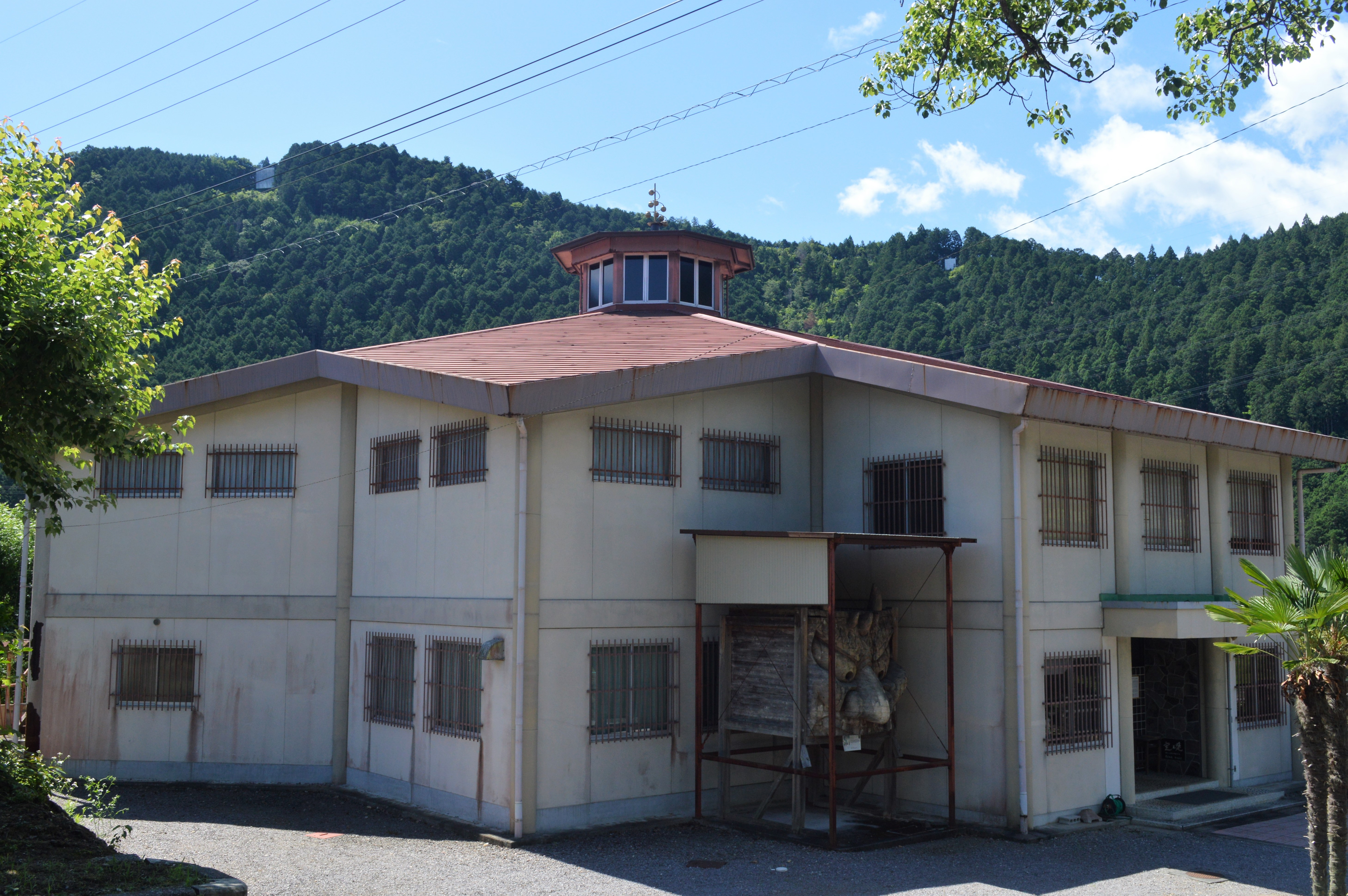 愛知県北設楽郡東栄町の花祭会館。